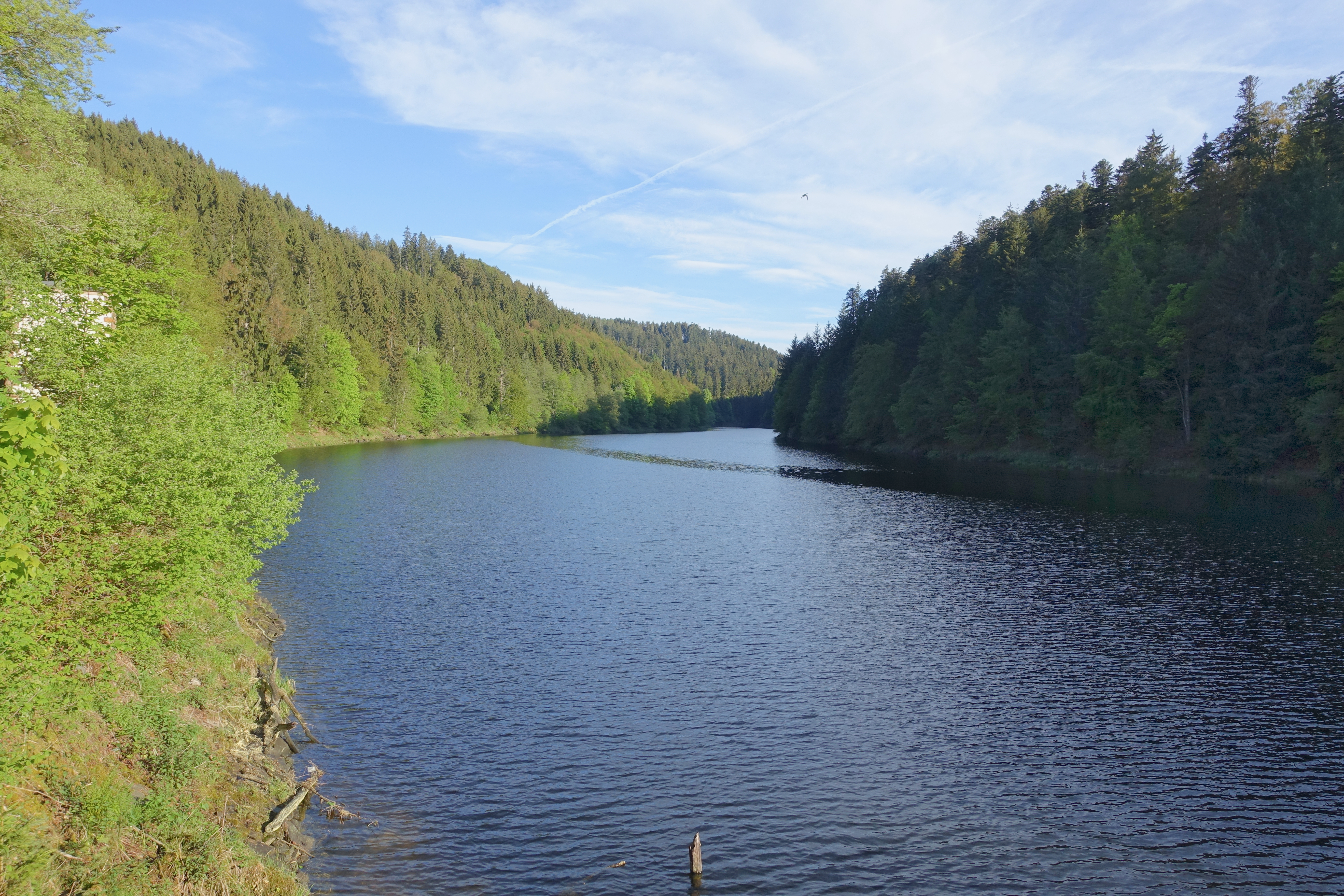 Mettmastausee